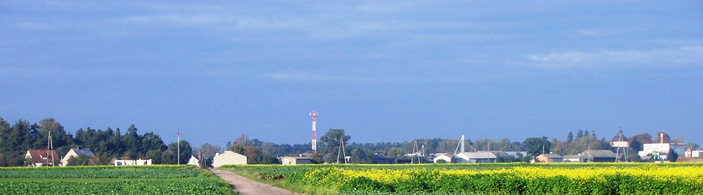 Parkowo od strony dzielnicy Huby